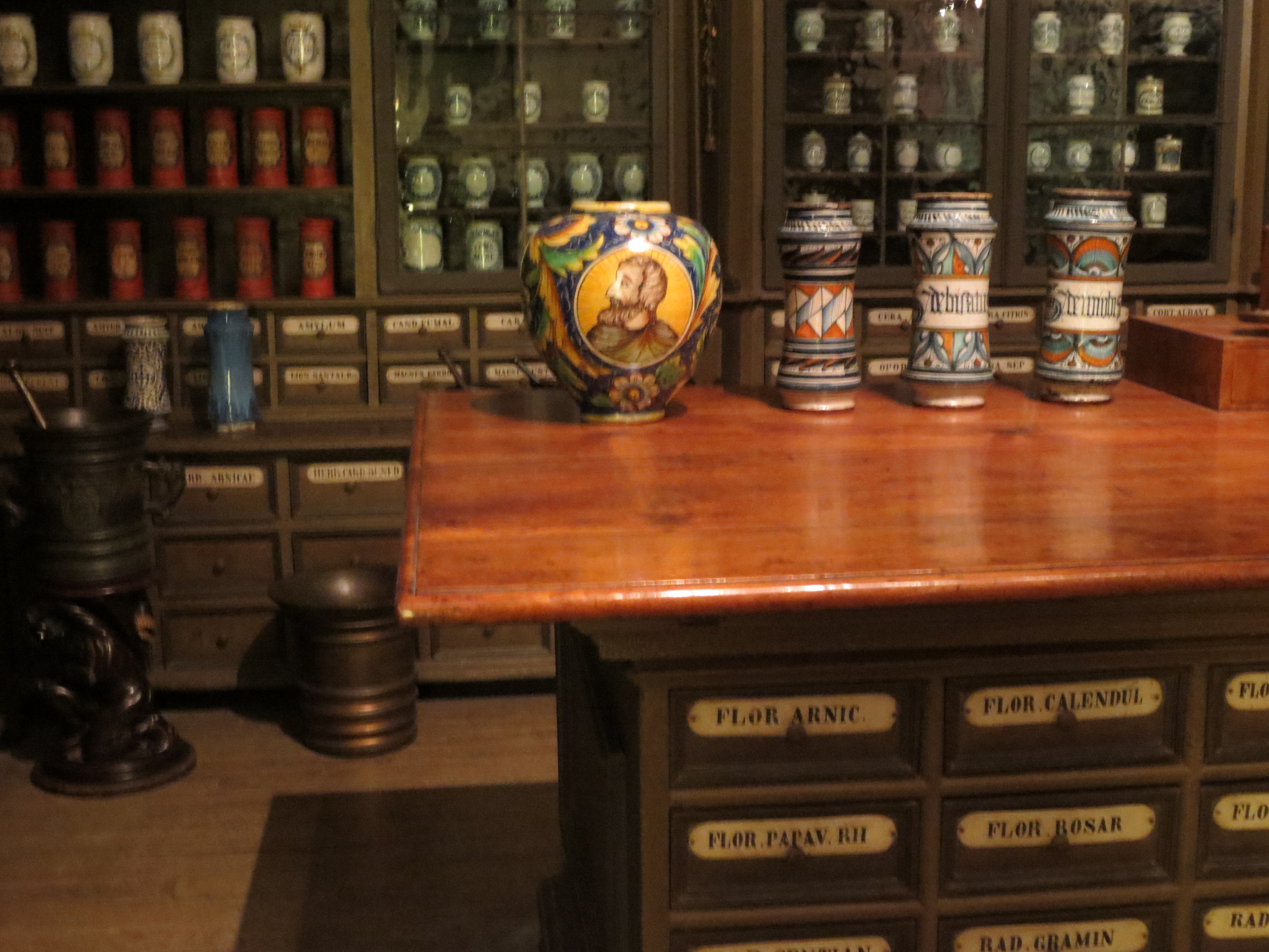 Teilansicht einer Apotheken Einrichtung mit Majolika Gefäßen auf einem Apothekerschrank für getrocknete pflanzliche Arzneistoffe, Bestand des Deutschen Apothekenmuseums